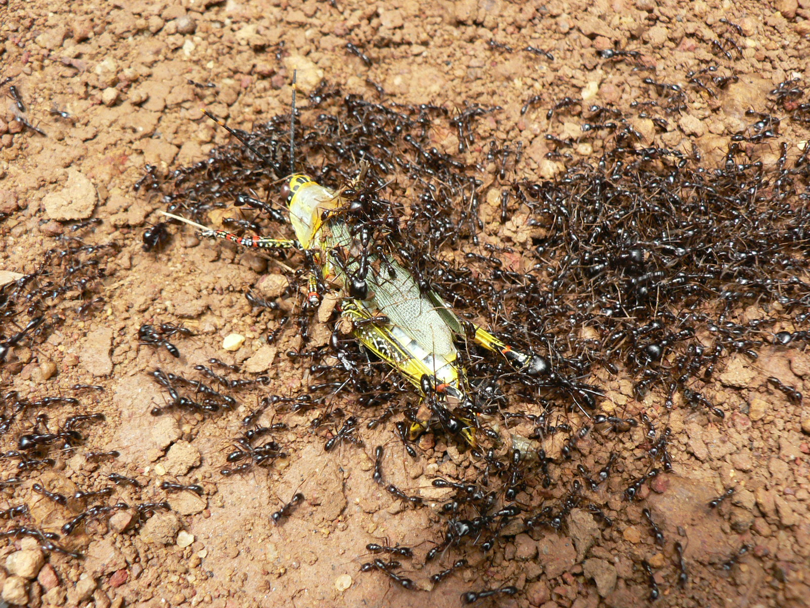 Treiberameise (Dorylus sp.) Nähe Nguti, Kamerun